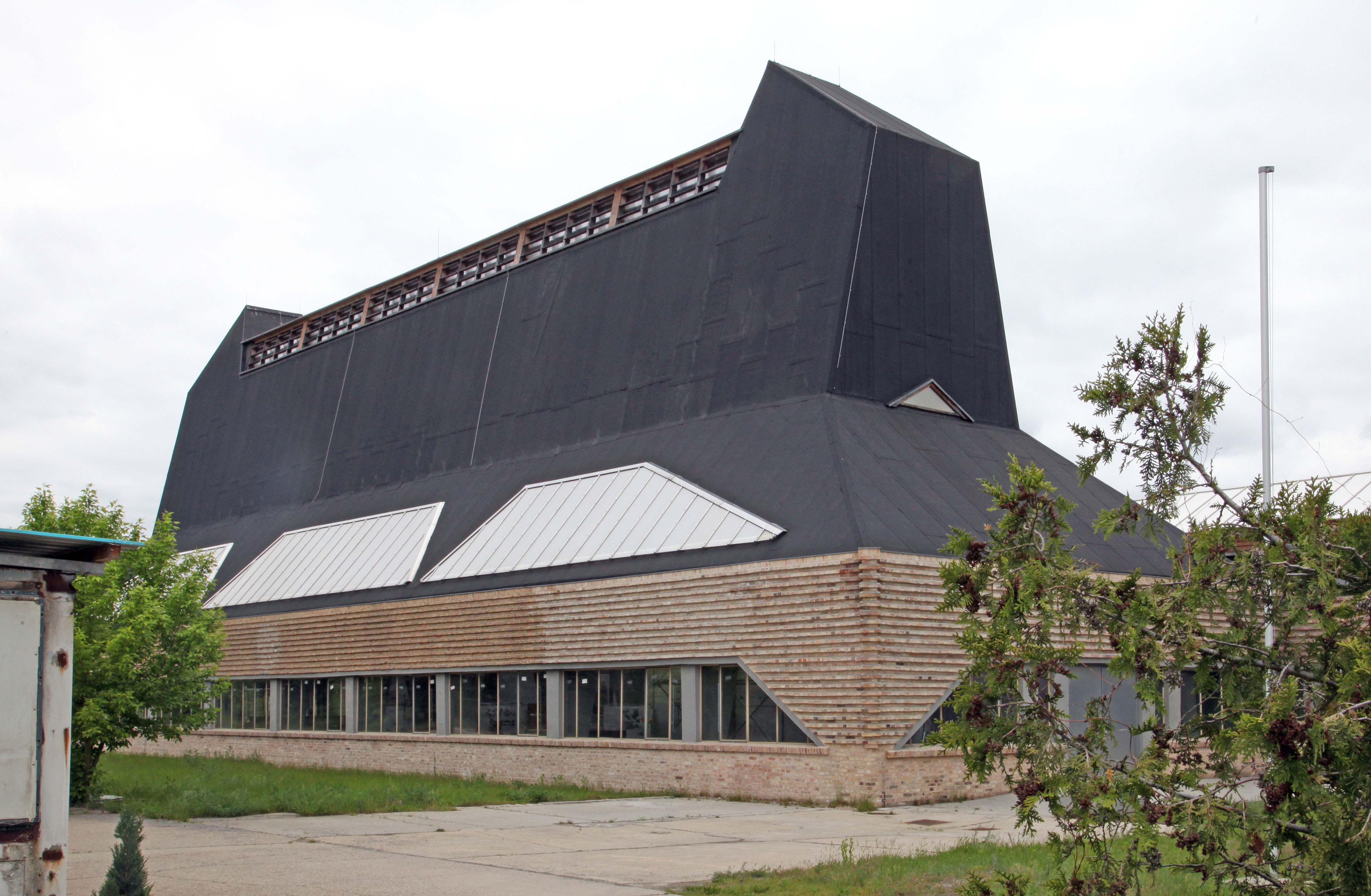 Färbereigebäude der Hutfabrik Friedrich Steinberg, Herrmann & Co. in Luckenwalde mit seiner typischen, einem Hut ähnelnden Dachhaube